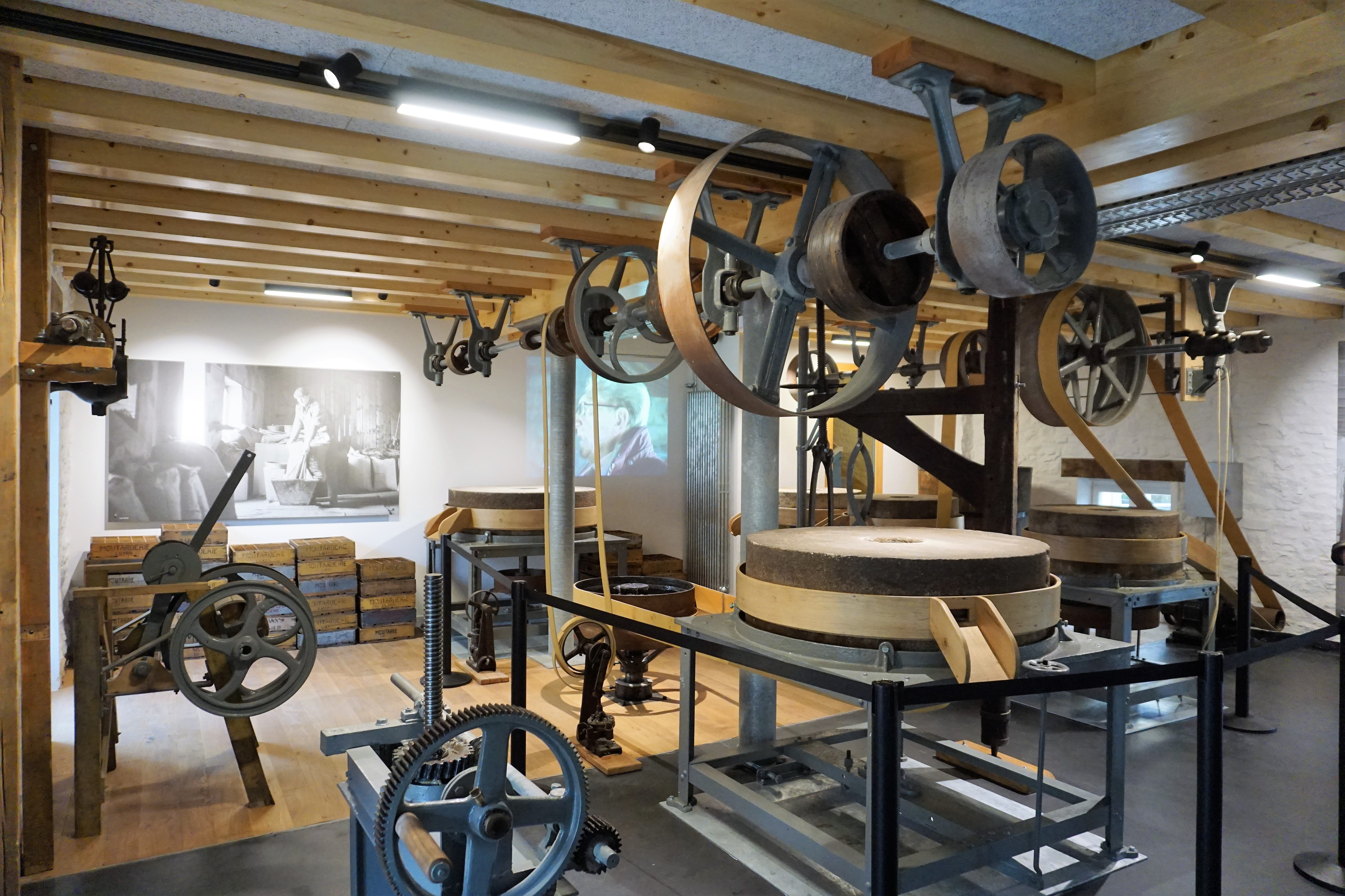 Luxembourg. Musée dans l'ancienne moutarderie « Muerbelsmillen ».